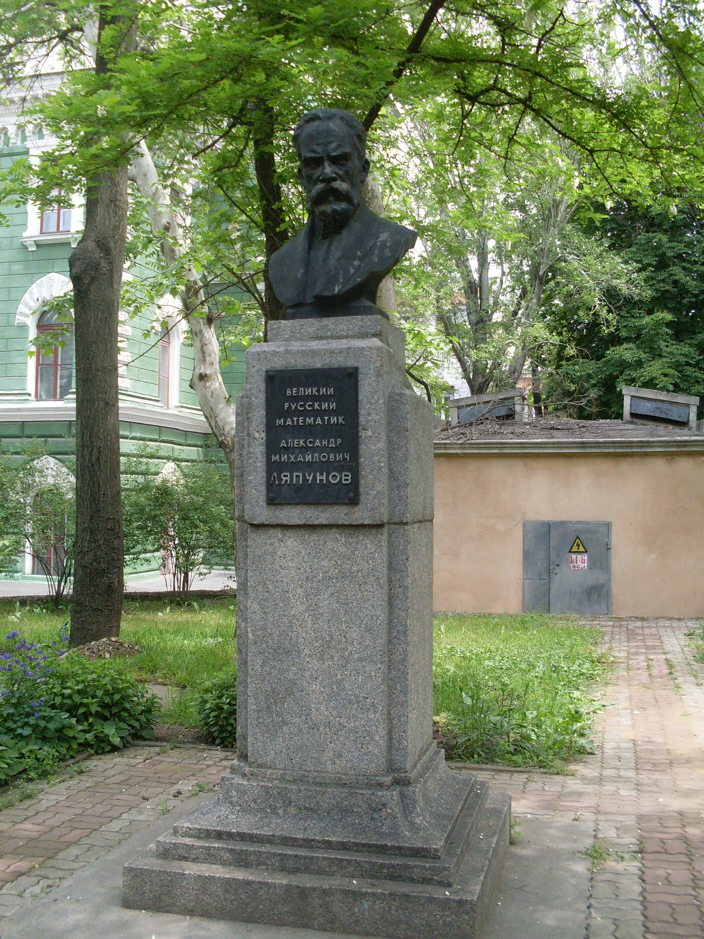 Памятник Александру Михайловичу Ляпунову в Одессе в дворике ОНУ им. И. И. Мечникова